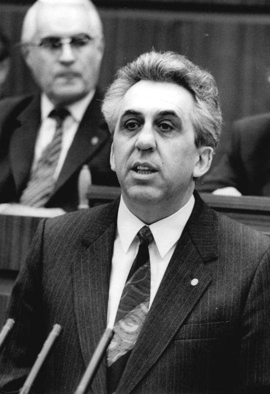 ADN-ZB Reiche 3.3.1989 Berlin: Tagung Volkskammer Der Vorsitzende der Wahlkommission der Republik, Egon Krenz, sprach auf der 8. Tagung der Volkskammer der DDR über den Gesetzentwurf zur Ergänzung des Gesetzes über die Wahlen zu den Volksvertretungen der Deutschen Demokratischen Republik.